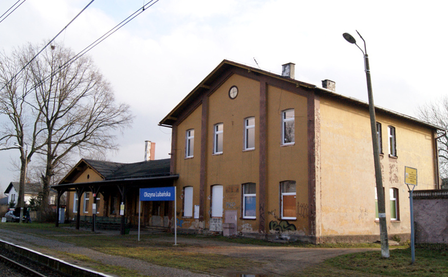 Przystanek kolejowy (d.stacja) Olszyna Lubańska.